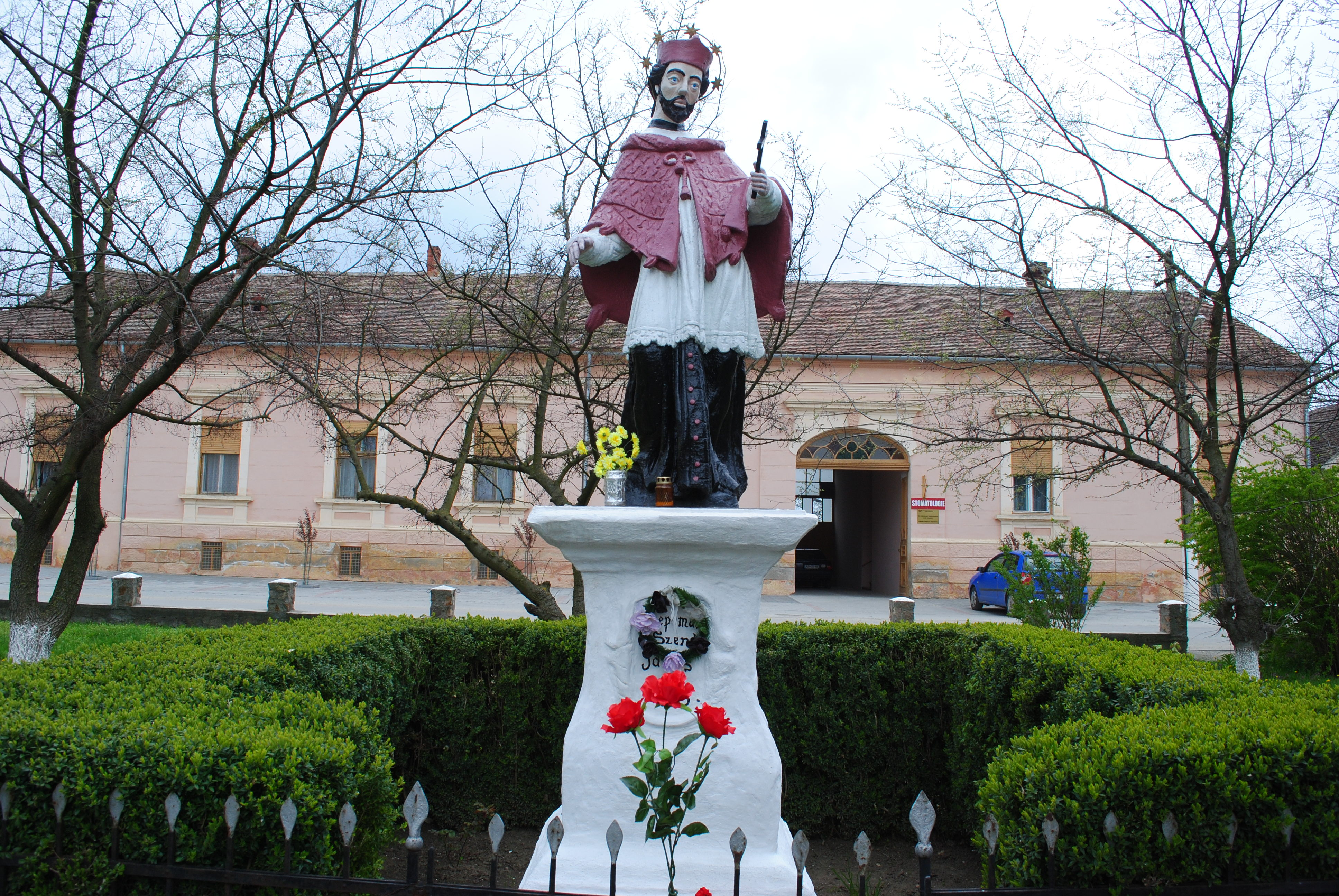 Ansamblul urban Pecica, 1850 - 1900